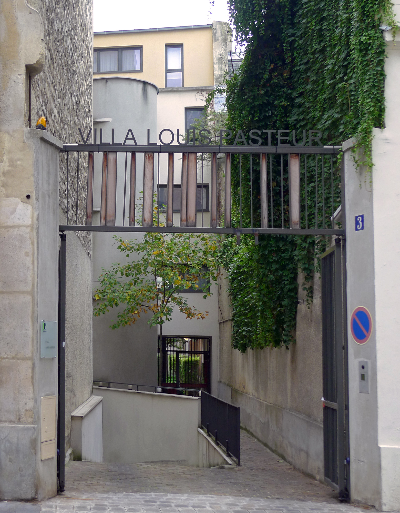 Entrée de la Villa Louis-Pasteur (n°3 rue de l'Abbé de l'Epée) - Paris V